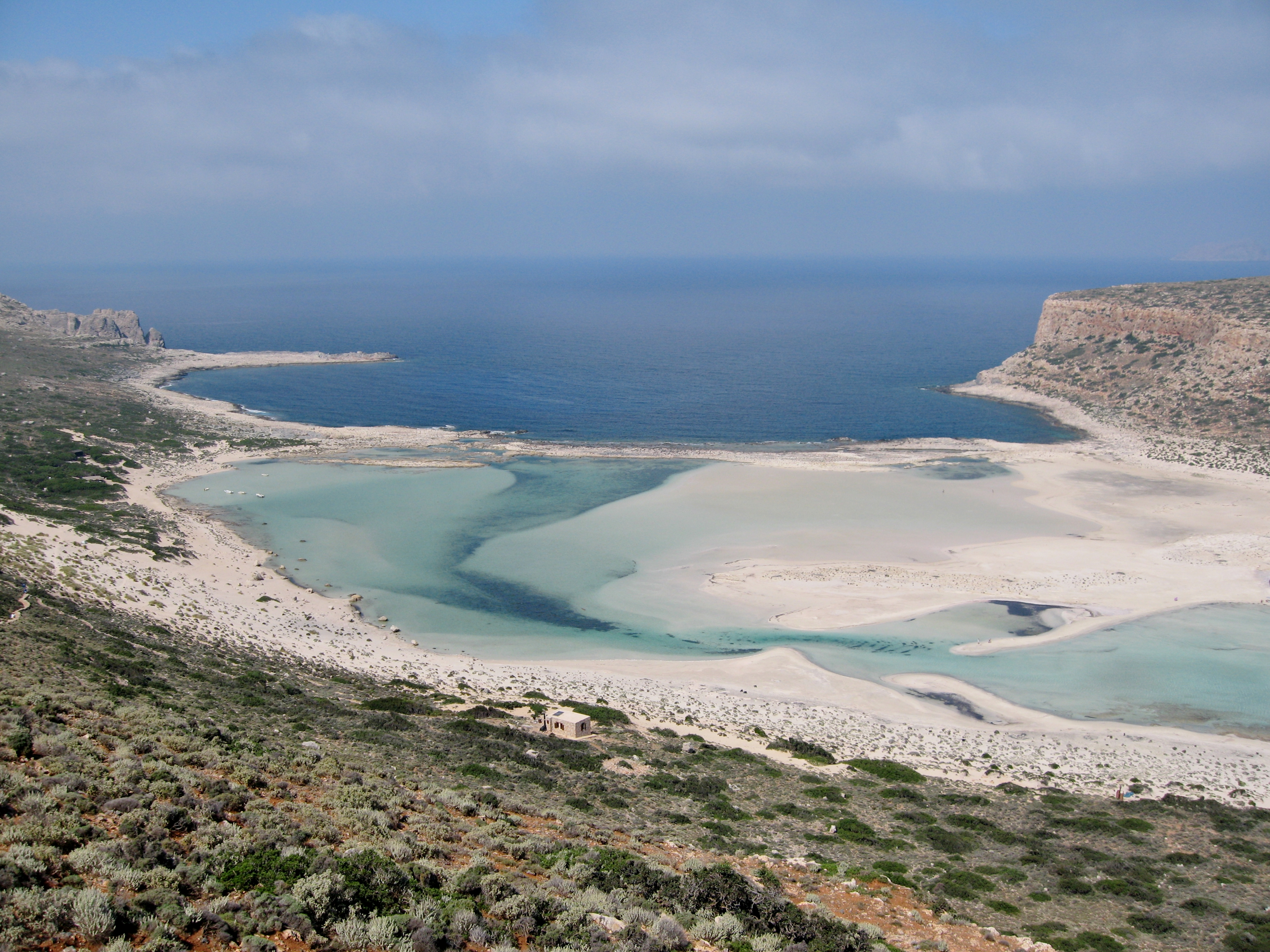 Bucht von Balos (Μπάλος), Gemeinde Kissamos, Regionalbezirk Chania, Kreta, Griechenland